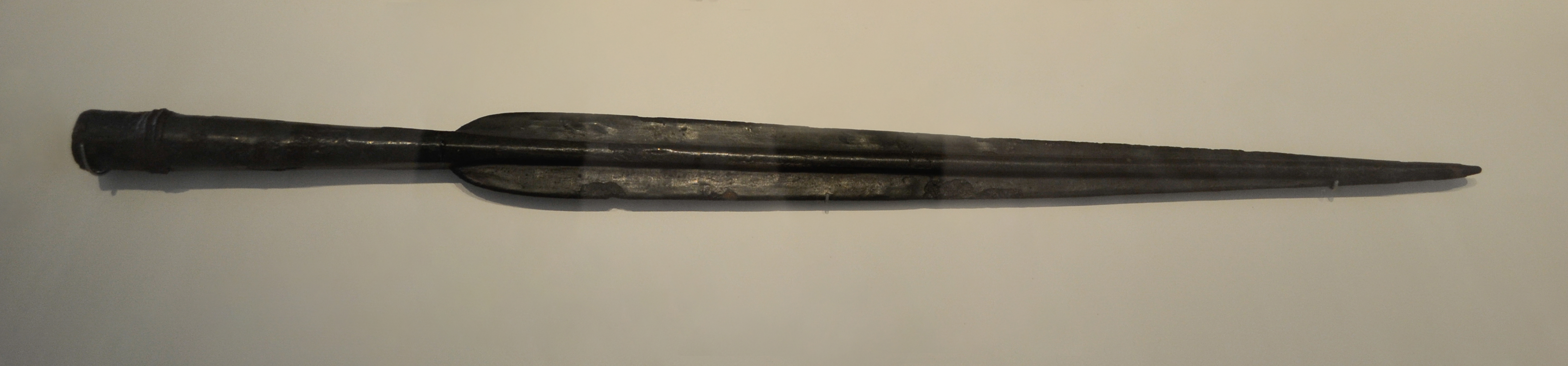 Hoja de lanza ibera. Procedencia: Necrópolis de Los Collados (Almedinilla, Córdoba). Primera mitad del siglo IV a. C. Longitud de la hoja: 39 cm. Longitud del enmangue: 14 cm. Nº Inv. 10358. Museo Arqueológico Nacional de España.